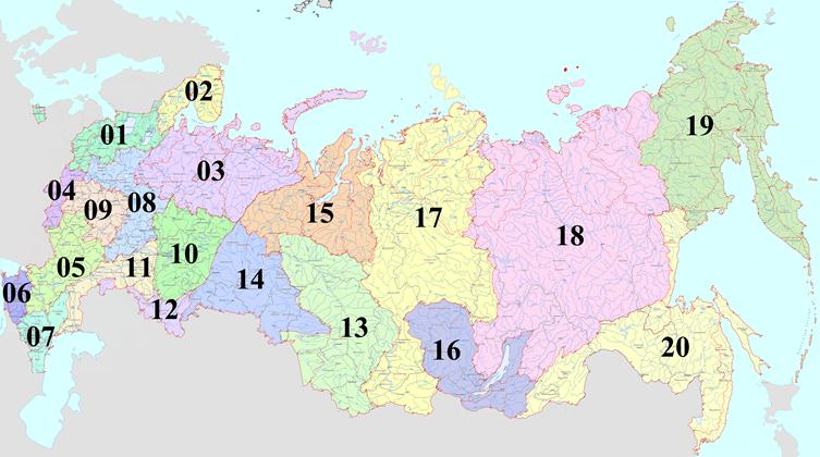 Схема бассейновых округов России с проставленными номерами: Балтийский бассейновый округ; Баренцево-Беломорский бассейновый округ; Двинско-Печорский бассейновый округ; Днепровский бассейновый округ; Донской бассейновый округ; Кубанский бассейновый округ; Западно-Каспийский бассейновый округ; Верхневолжский бассейновый округ; Окский бассейновый округ; Камский бассейновый округ; Нижневолжский бассейновый округ; Уральский бассейновый округ; Верхнеобский бассейновый округ; Иртышский бассейновый округ; Нижнеобский бассейновый округ; Ангаро-Байкальский бассейновый округ; Енисейский бассейновый округ; Ленский бассейновый округ; Анадыро-Колымский бассейновый округ; Амурский бассейновый округ. Составлена из карт из приложения к Приказу Министерства природных ресурсов РФ. Само приложение как официальный документ РФ не охраняется авторским правом. Контуры стран и территорий за пределами РФ изображены примерно. Оригинал карты без номеров в полном разрешении: File:Basin regions.jpg